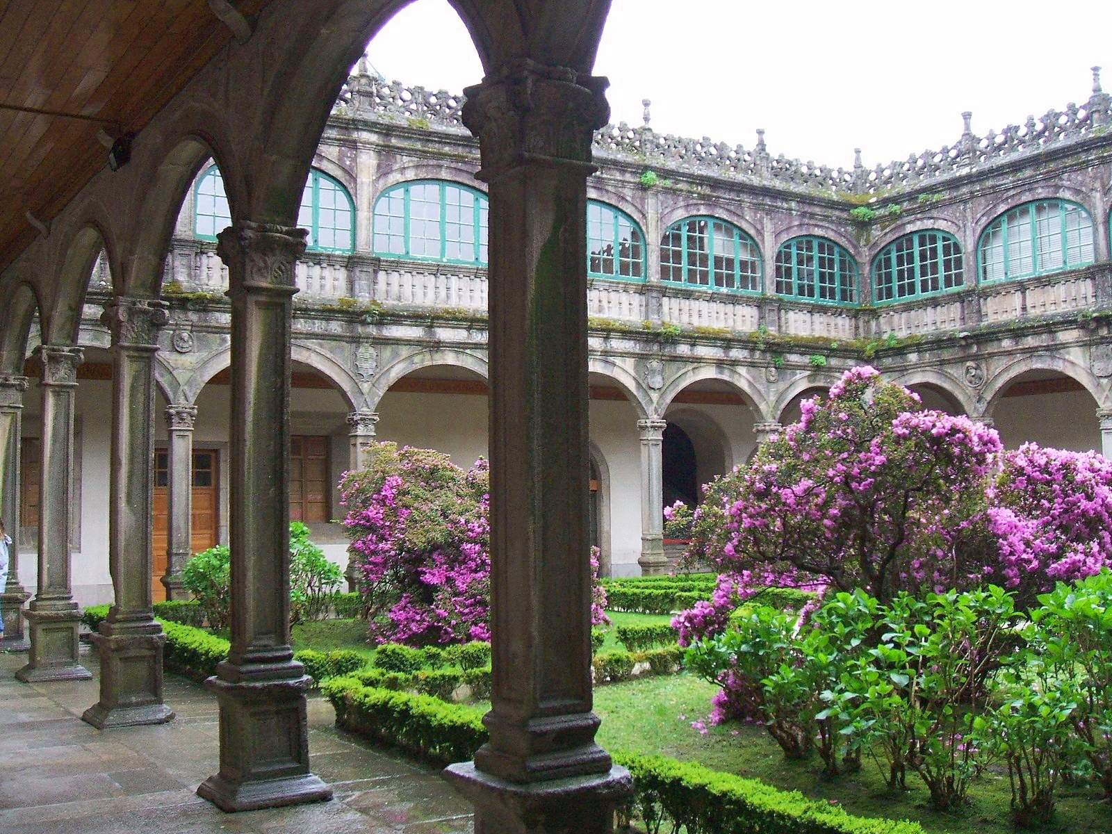 Santiago de Compostela - Colegio de Fonseca (o de Santiago Alfeo), Biblioteca General de la Universidad